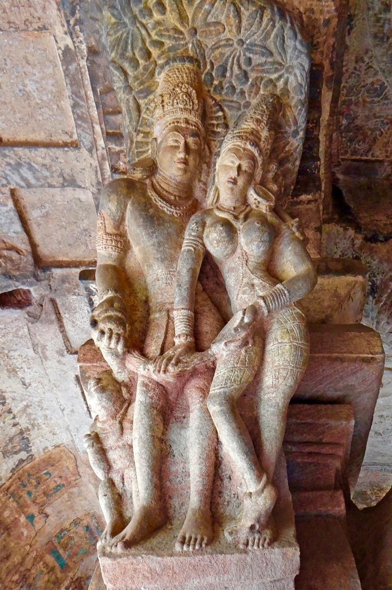 Couple sculpté sur une des colonnes du mandapa du grand temple troglodytique dédié à Vishnou (grottes de Badami) Ce temple, creusé dans le rocher et dédié à Vishnou, date de 578, c'est le plus grand et le plus beau des quatre temples en raison de la qualité des groupes sculptés (en consoles) et des reliefs sur les parois. Wikipedia sur Badami